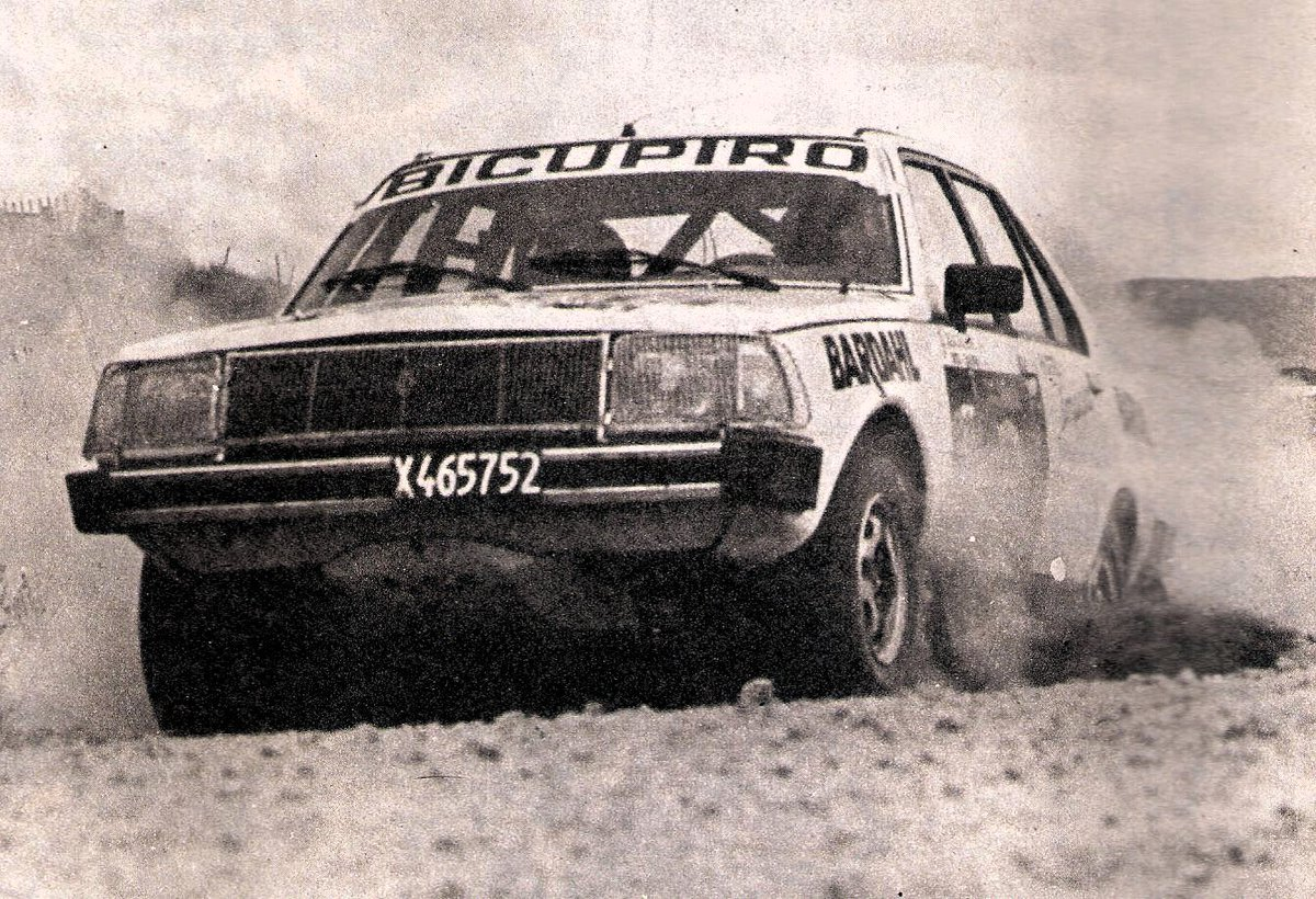 Jorge Recalde en el Rally Vuelta de la Manzana 1982, conduciendo un Renault 18.